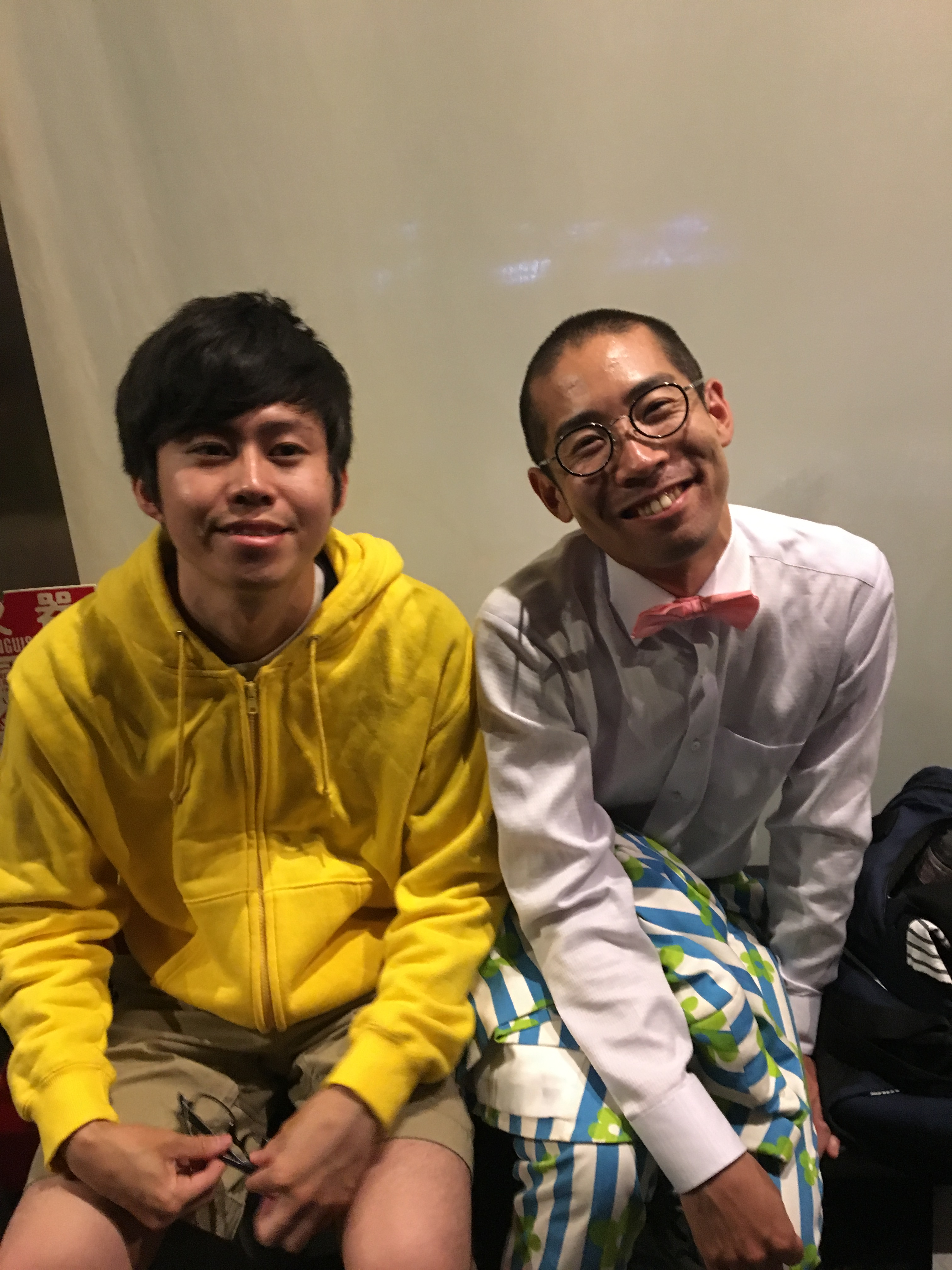 プーケットマーケット